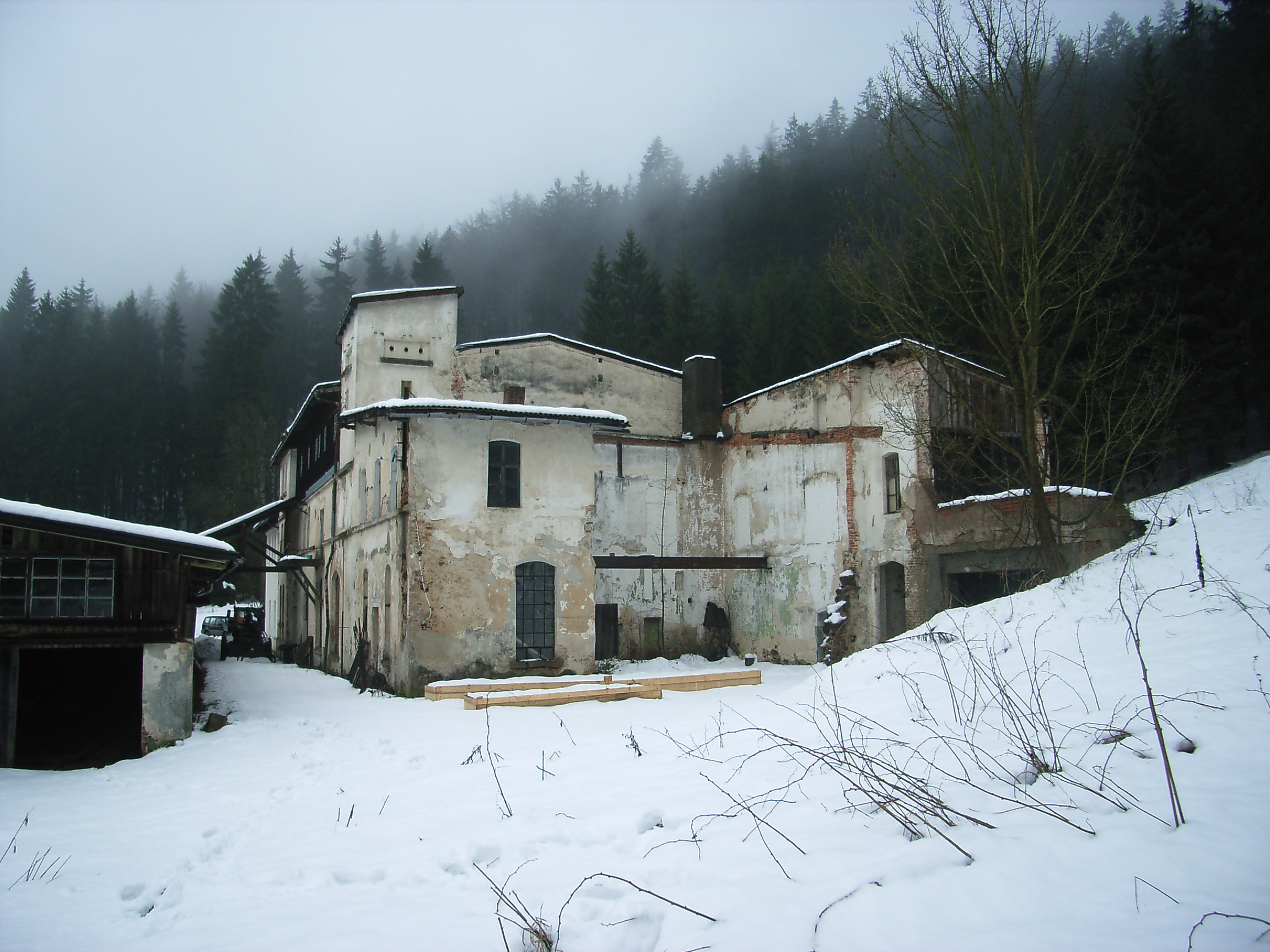 Rosenhof, alte Fabrik von Osten (2012)